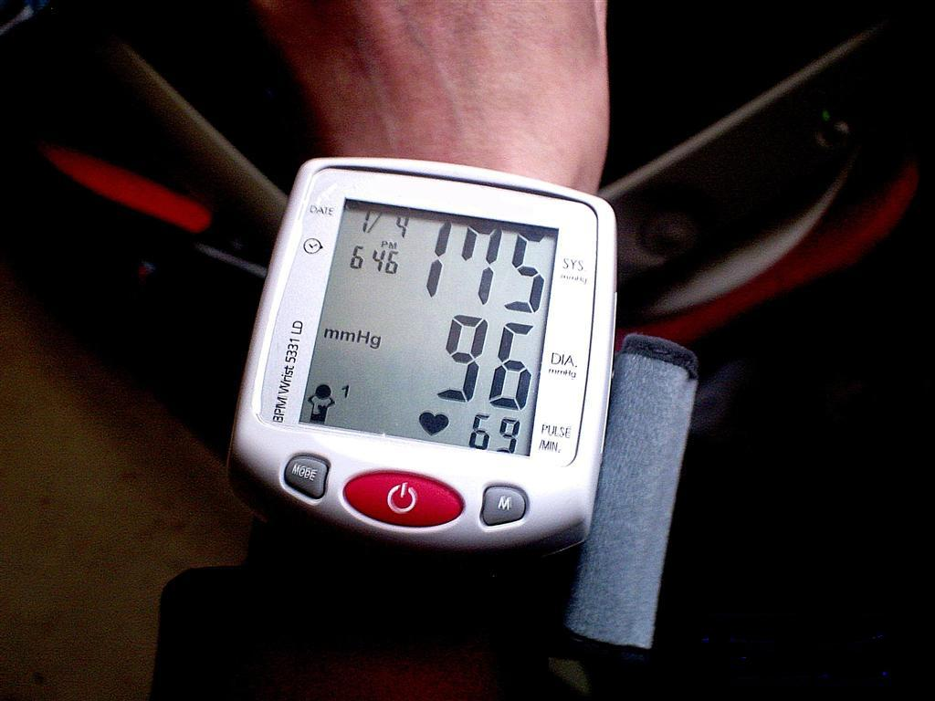 tensiomètre électronique en mesure directe sur poignet